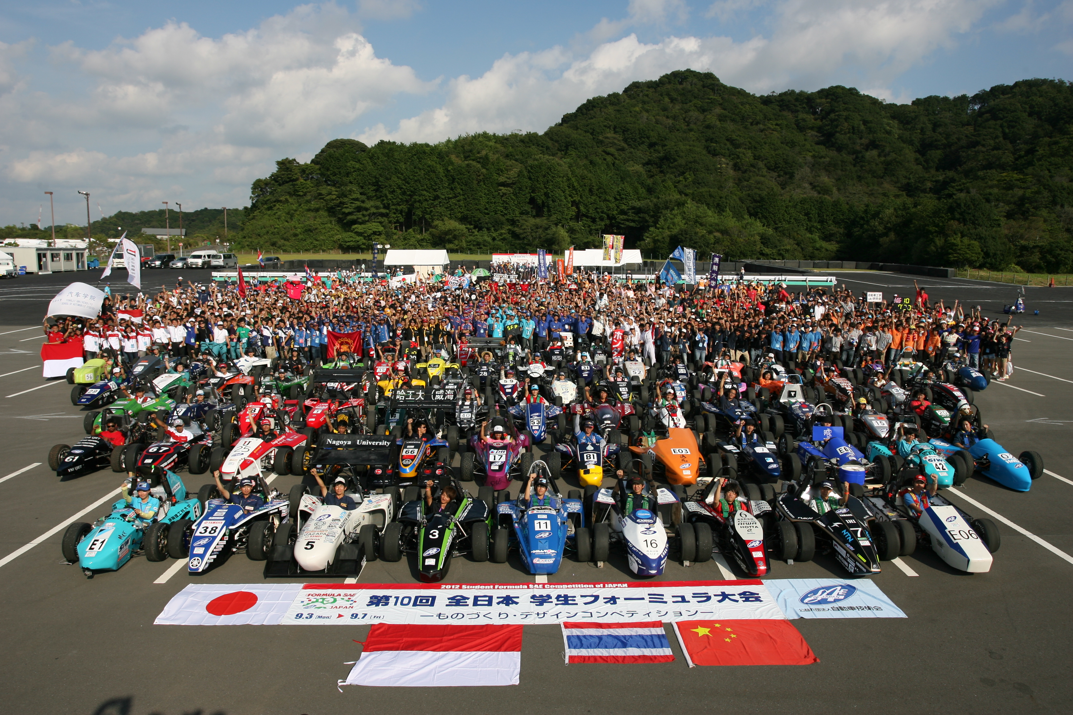 2012集合